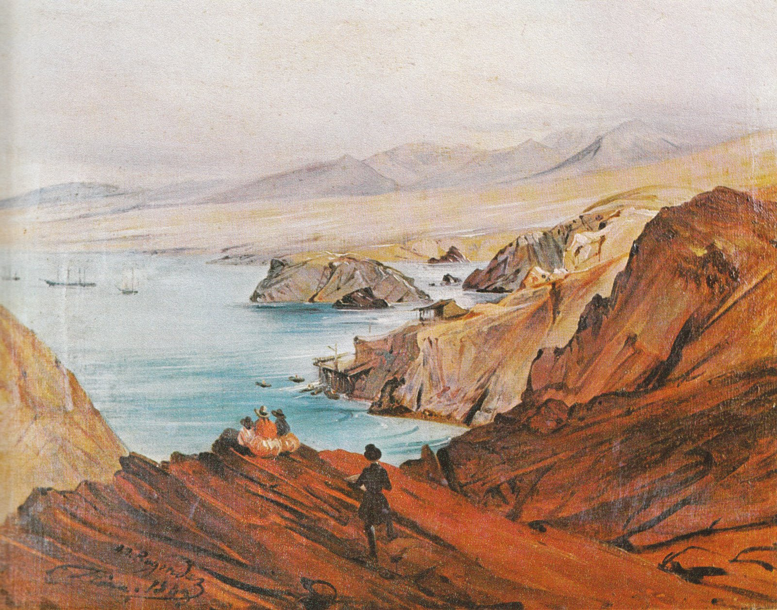 Puerto de Islay, óleo, Islay, Arequipa, Perú, 1843, Johann Moritz Rugendas. El pintor aparece en primer plano, con traje oscuro y sombrero.